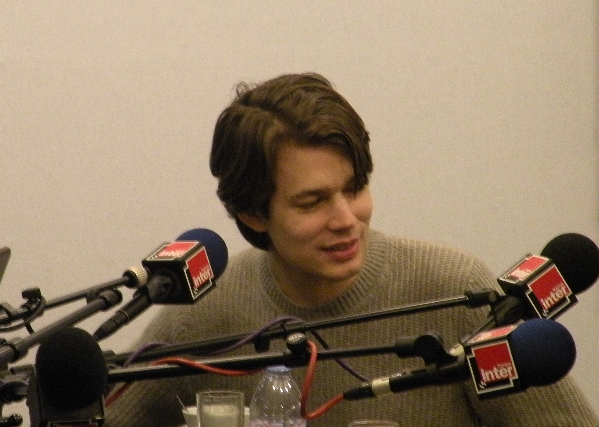 David Fray, pianiste français, interviewé sur France Inter le 31 janvier 2009 lors de La Folle Journée de Nantes.